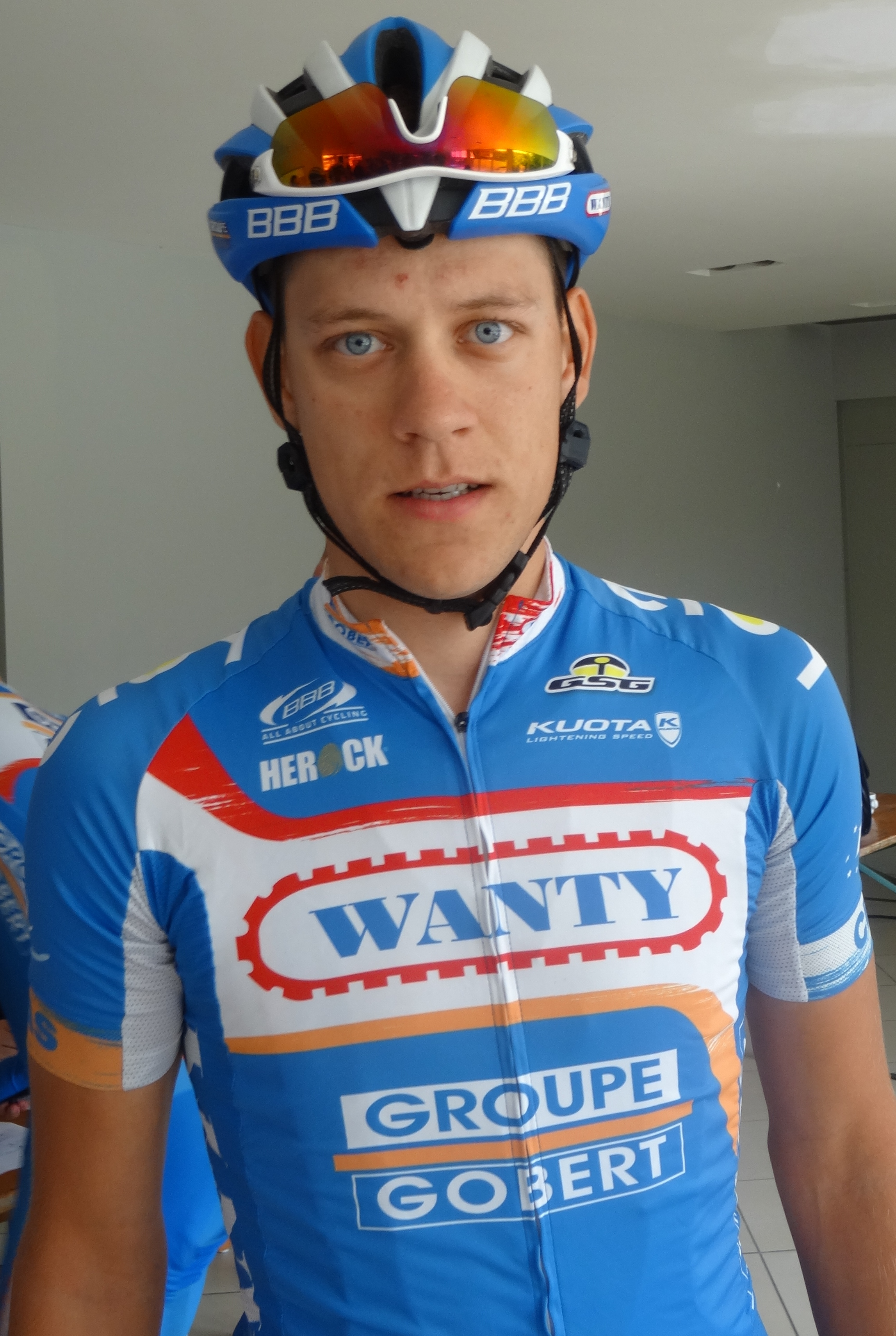 Reportage photographique réalisé le samedi 13 septembre à l'occasion du départ et de l'arrivée de la Flèche côtière 2014 à Heist (Knokke-Heist), Belgique.